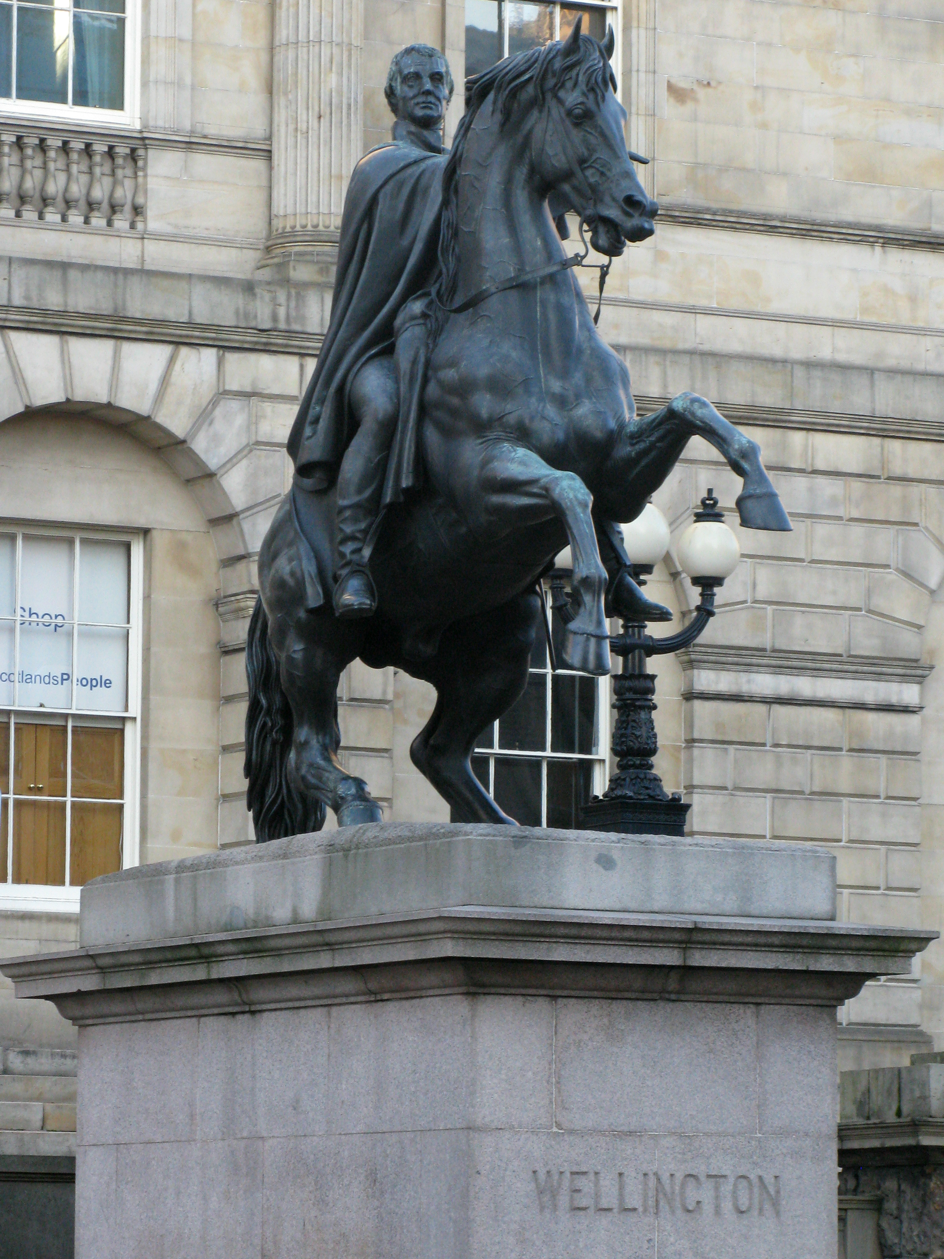 Wellington 2